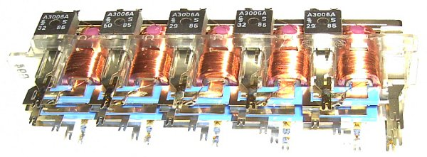 ESK 5-fach Relaisstreifen mit angebauter Diode pro Relais